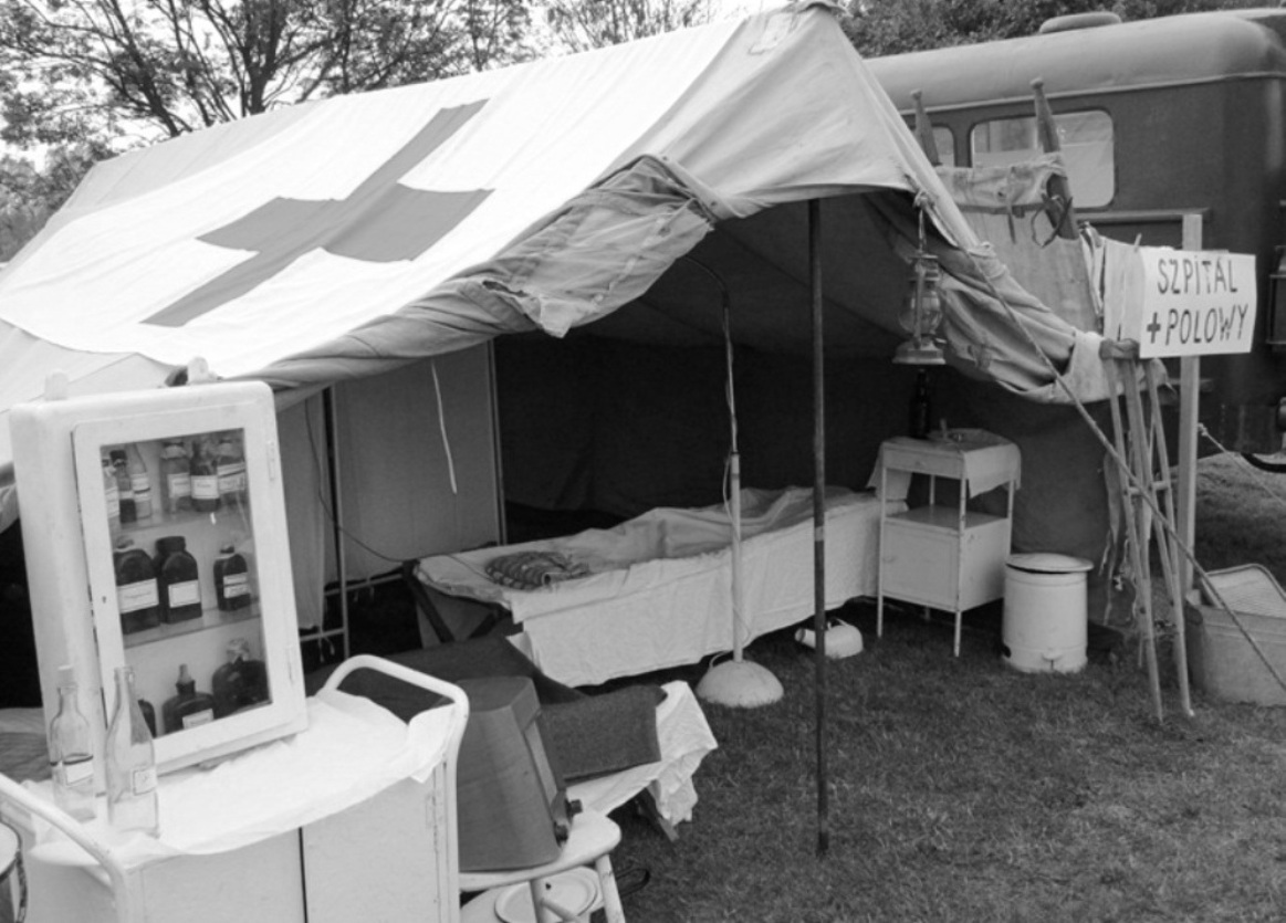 Brusy, 13.09.2015r. Rekonstrukcja szpitala polowego